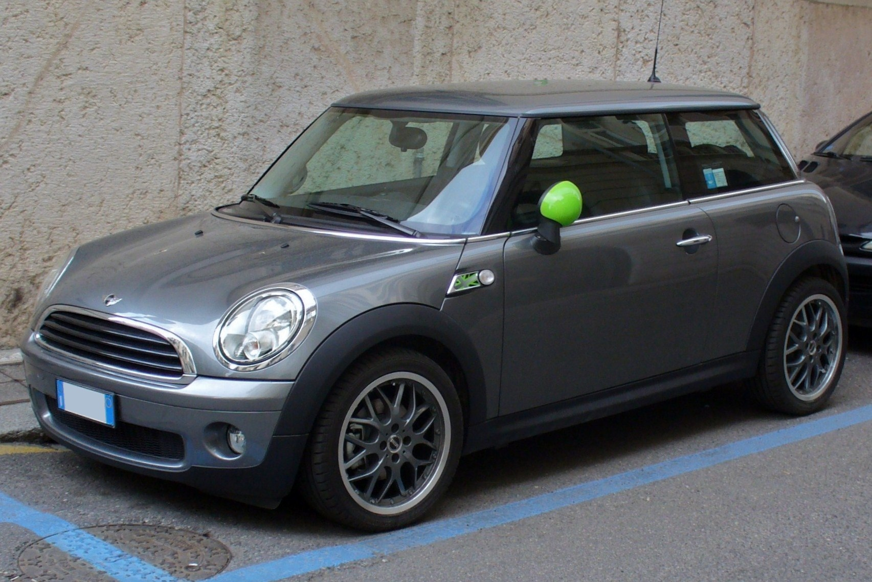 Mini One Ray